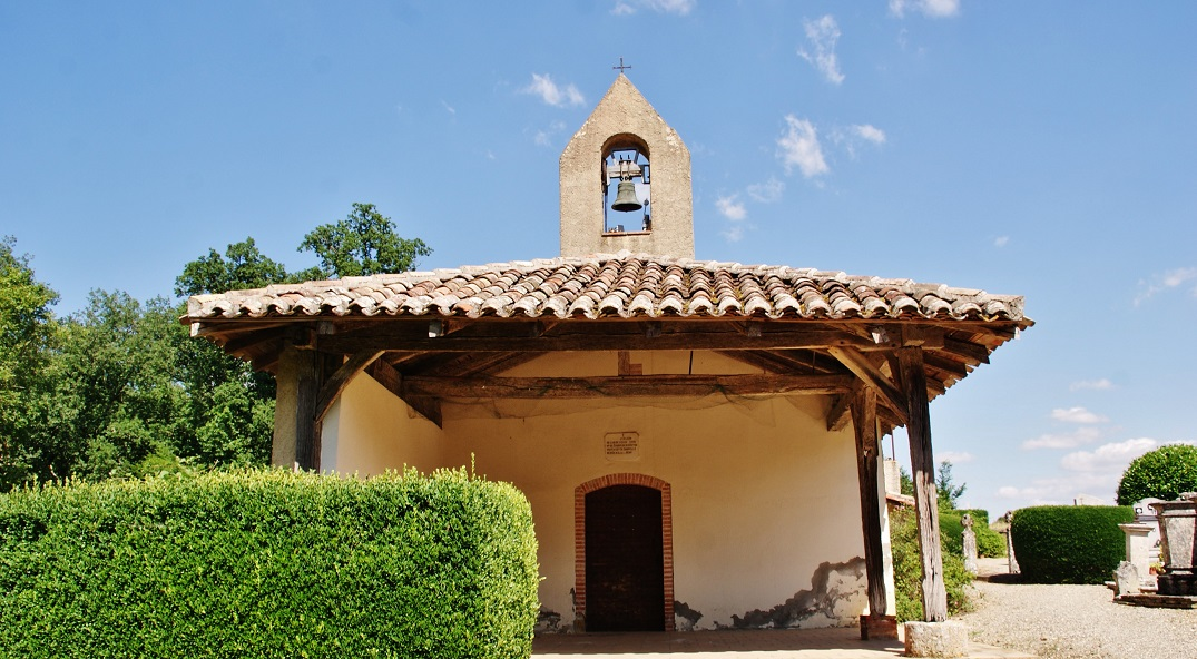 église St Remy